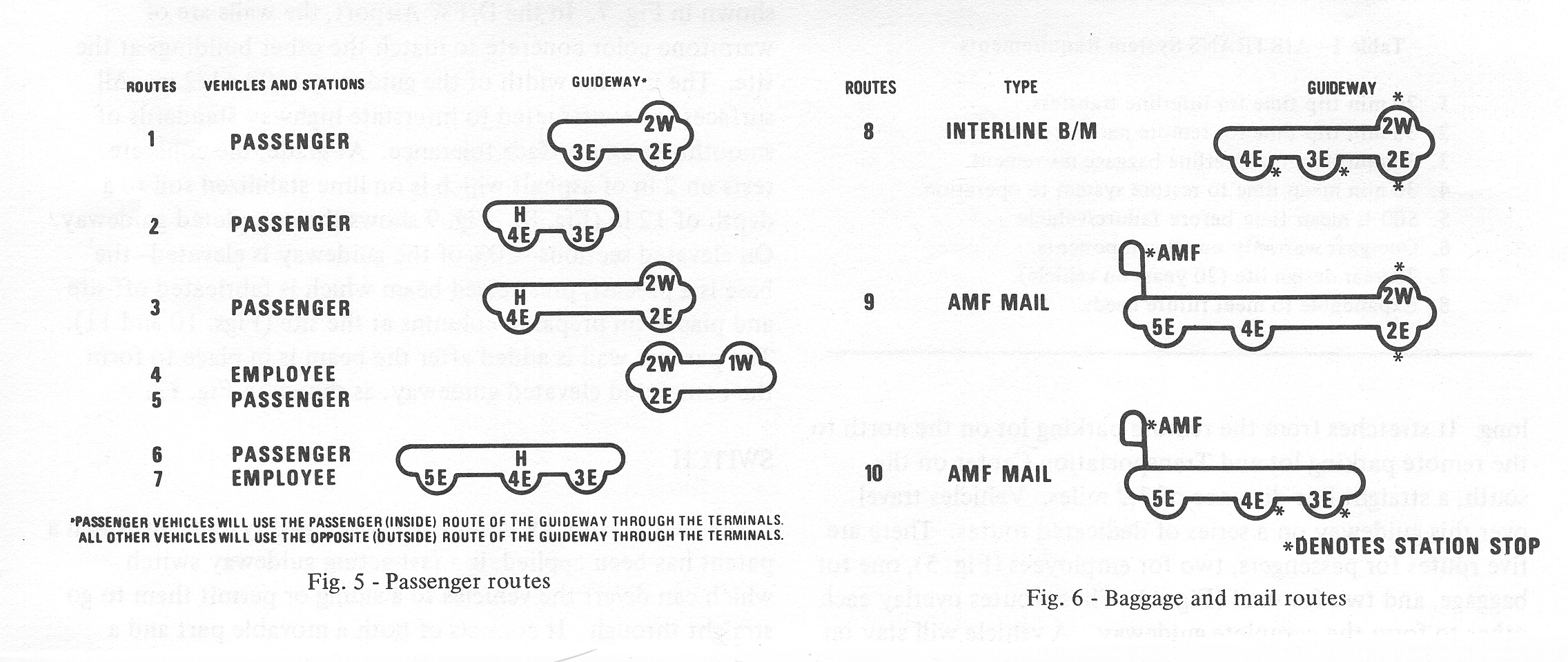 Airtrans Routes